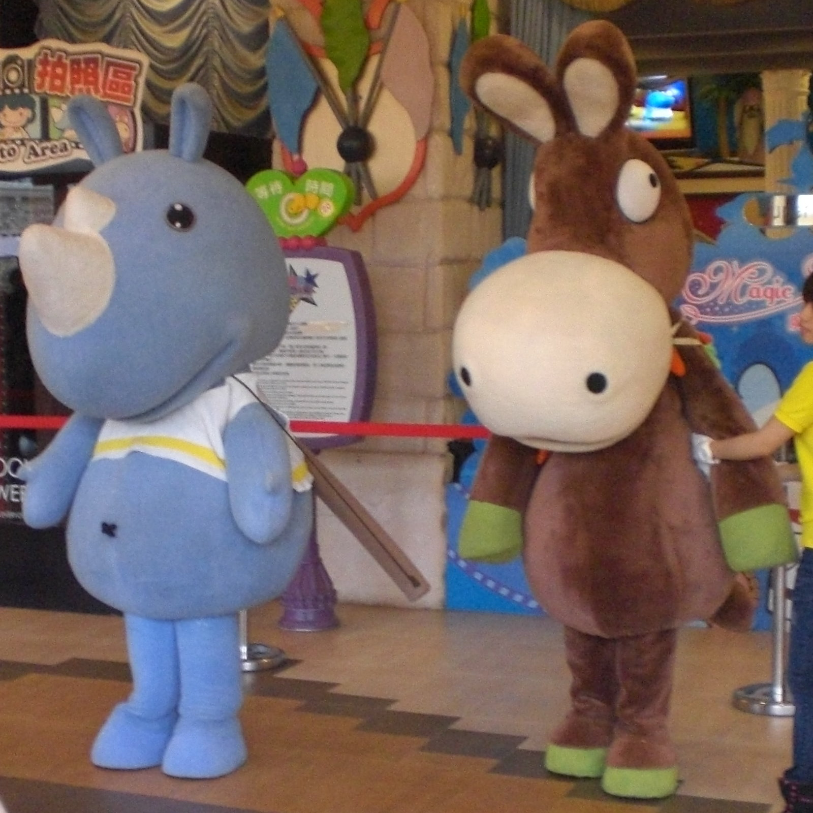 義大遊樂世界的吉祥物：大義（左）、唐基（右）。